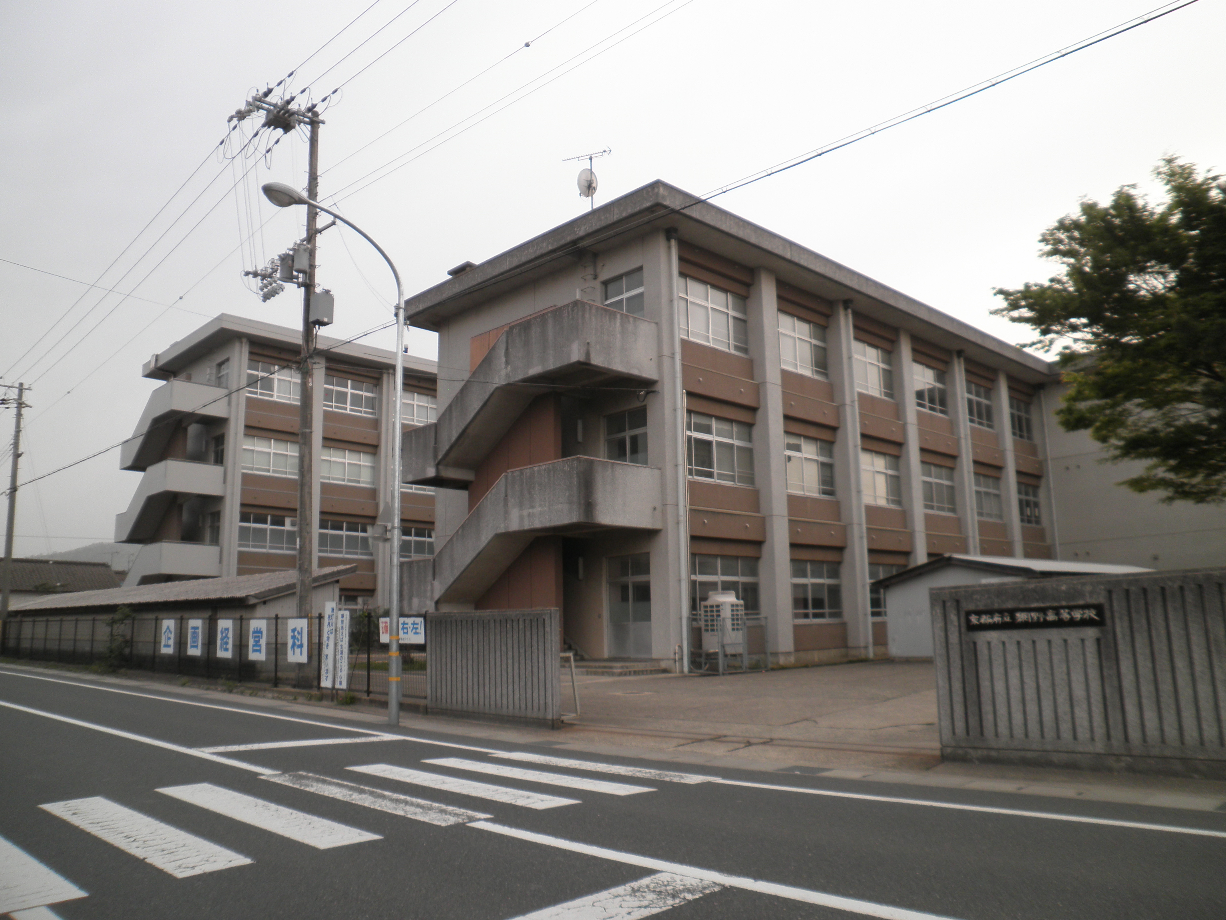 京都府京丹後市網野町にある京都府立網野高等学校（京都府立網野高校）の本校